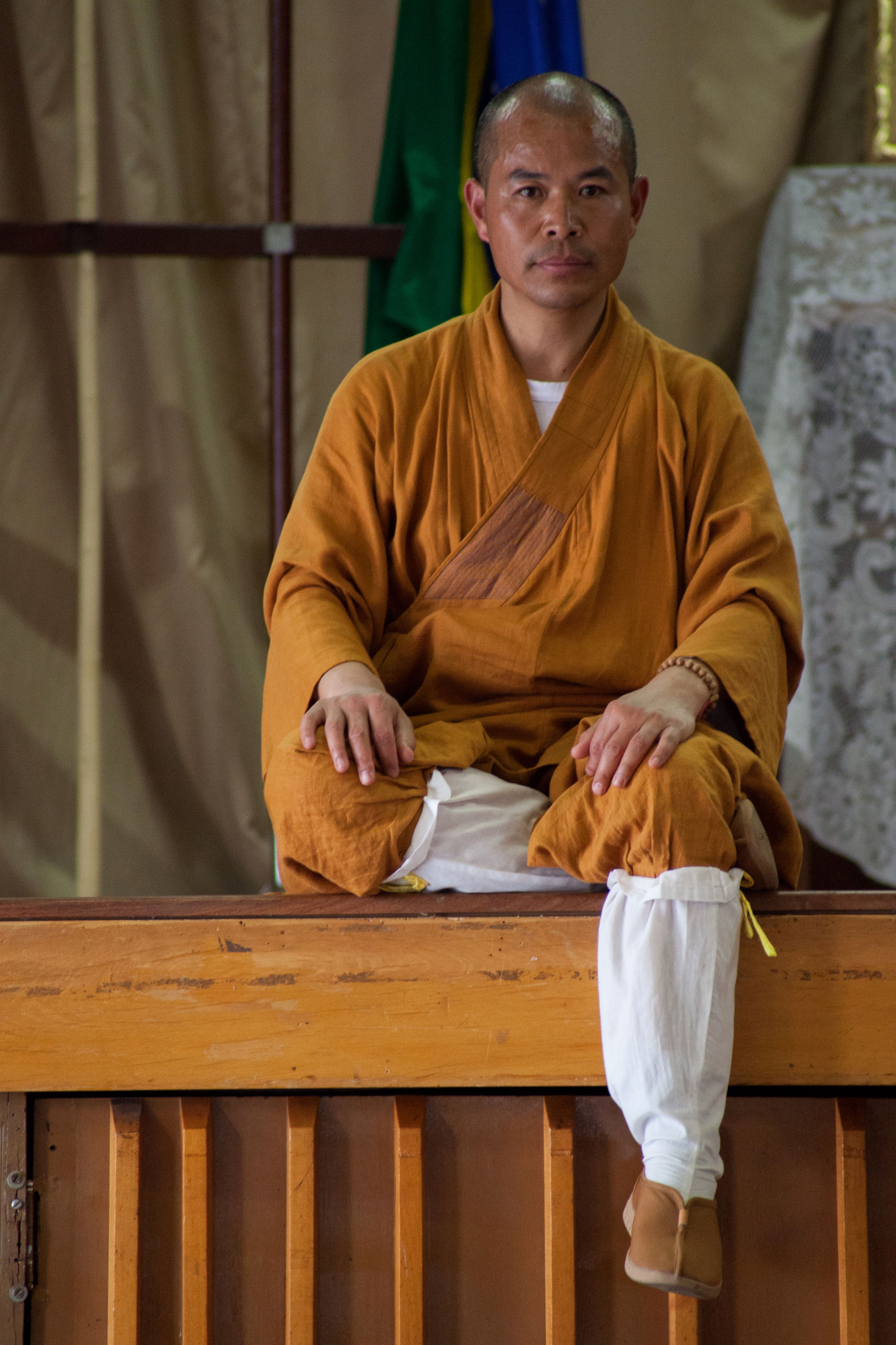 Shi De Yang visita o Brasil, fotografado na Associação Aichi do Brasil a convite do Instituto e Templo Lohan.